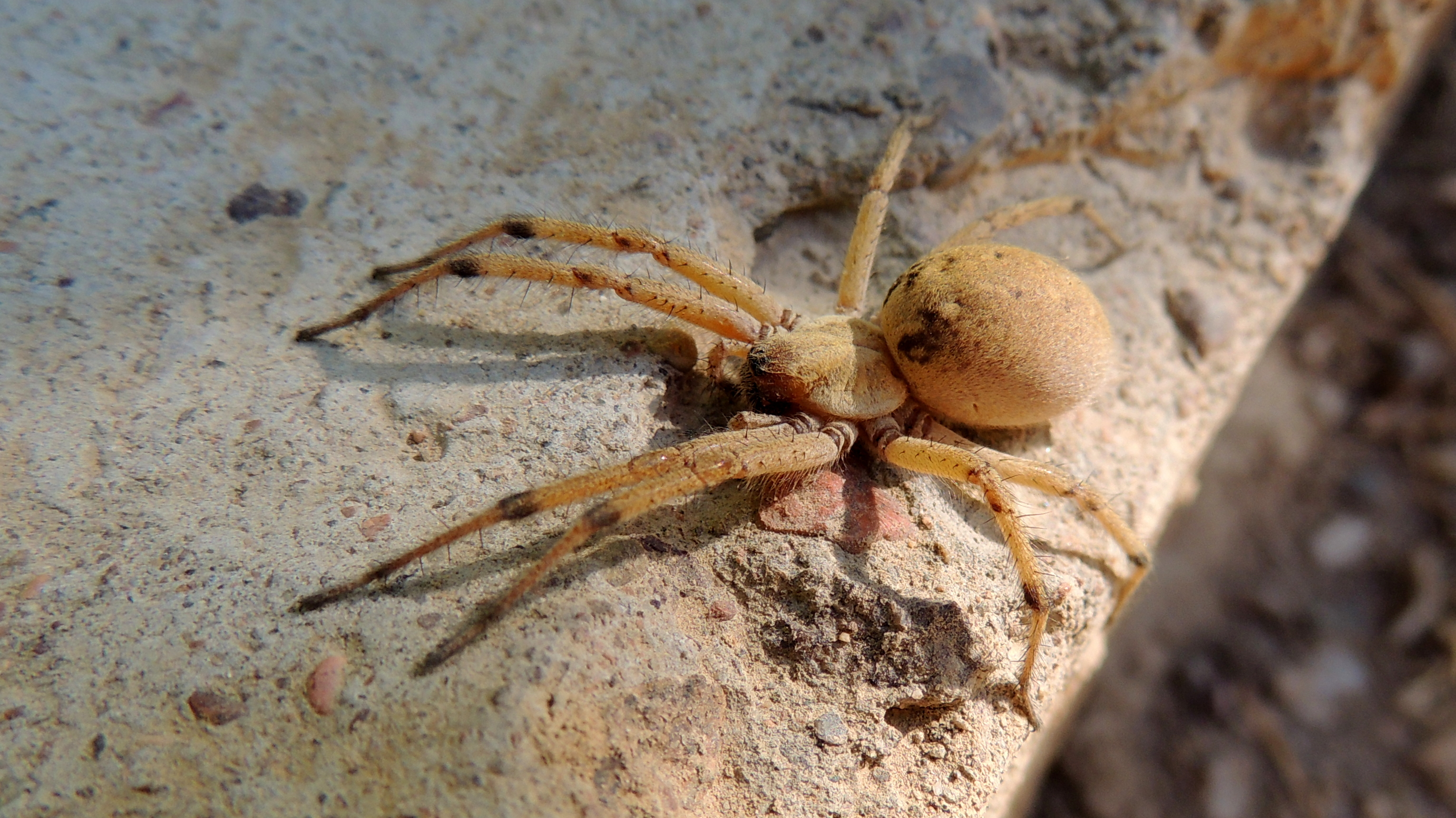 Agelena orientalis female. Узбекистан